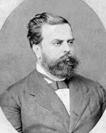 A photograph depicting Brazilian poet Pedro Luís Pereira de Sousa